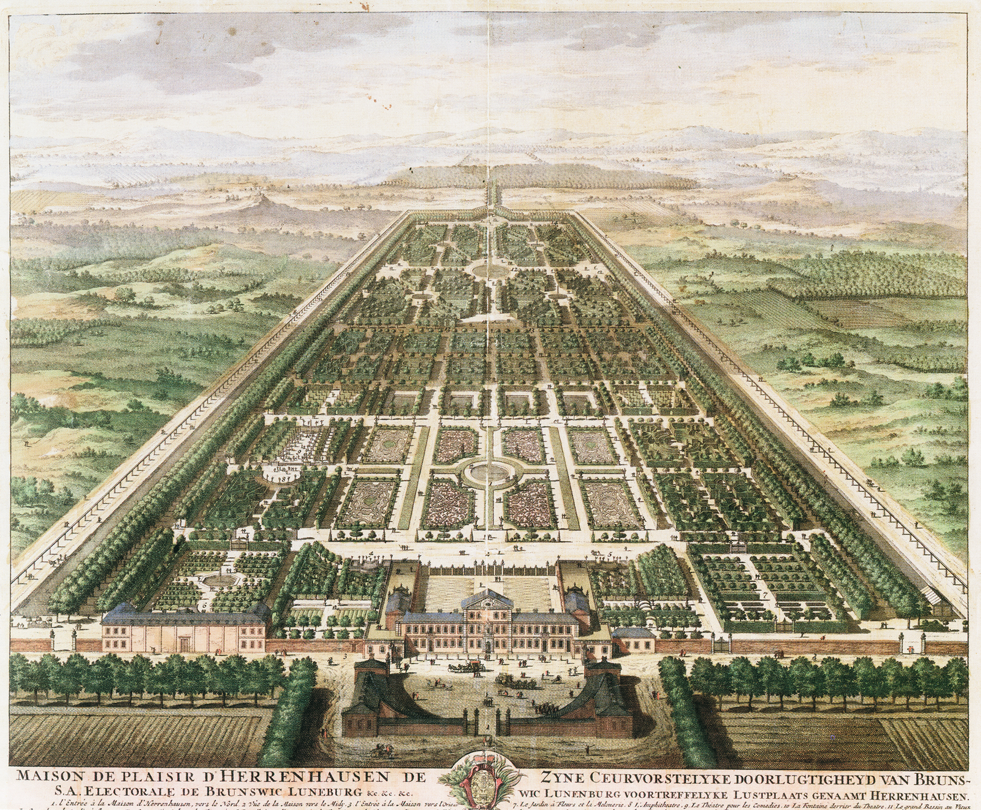 Vogelschau / historische Ansicht des Großen Gartens in Hannover-Herrenhausen, Kupferstich, um 1708.